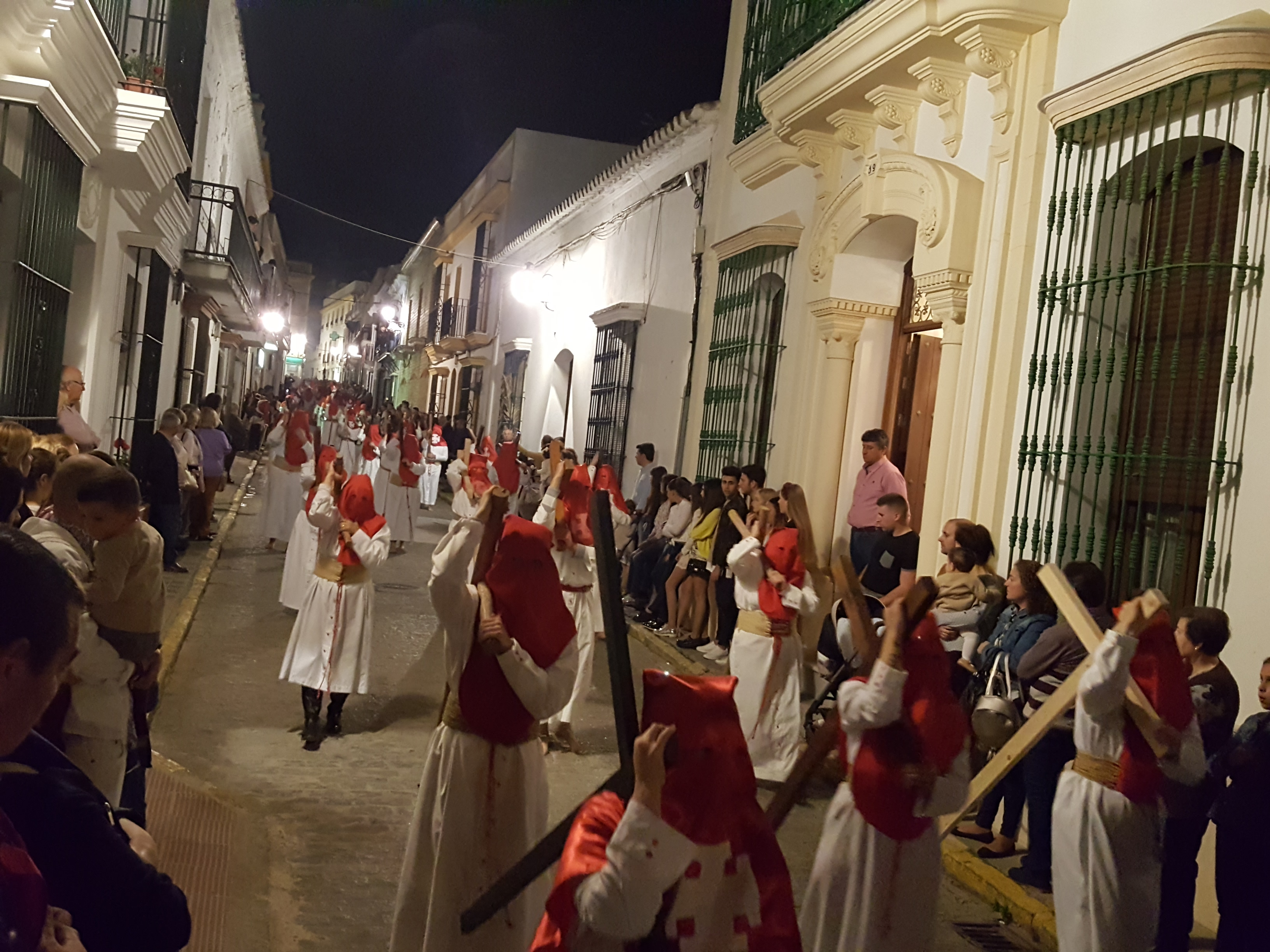 Hermandad del Cristo de la Sangre. Desfile procesional del Martes Santo. Vista del desfile procesional por el casco urbano de Moguer.